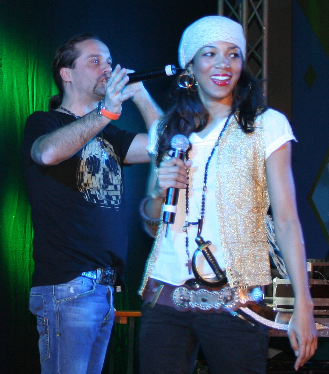 Alex C. (li.) und Y-Ass beim Lumpenball "Freibeuter der Fastnacht" in der Mainzer Rheingoldhalle